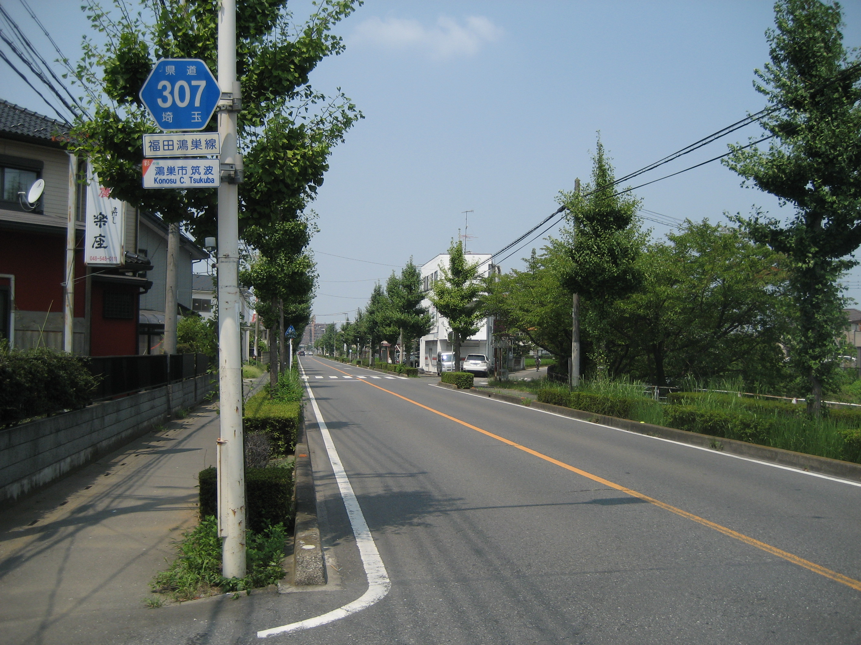 埼玉県道307号線鴻巣市筑波付近